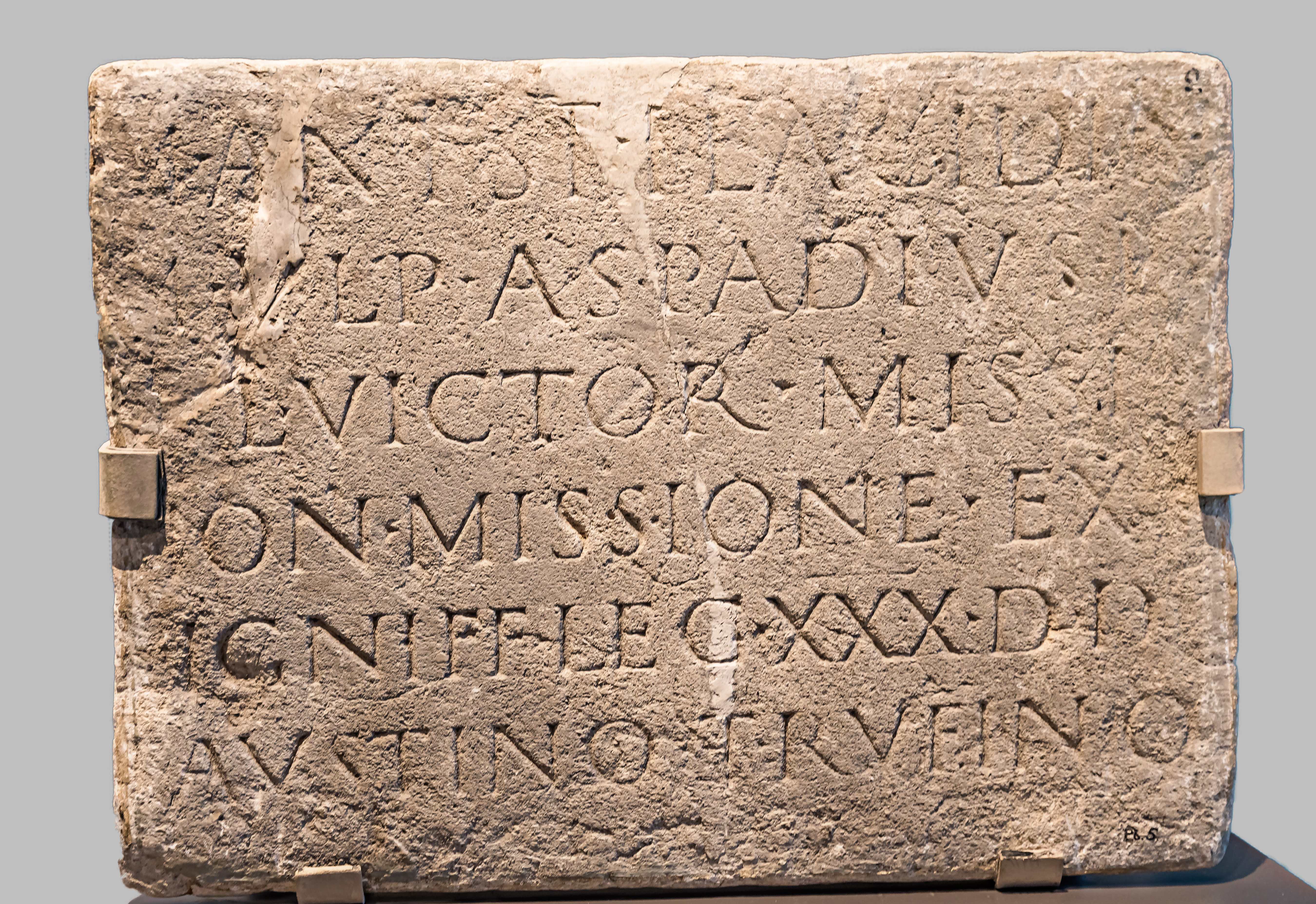 Ein Weihealtar von 210, aus dem Jahr als Manius Acilius Faustinus und Triarius Rufinus das ordentliche Konsulat ausübten. Der Altar wurde von drei aus dem Dienst ehrenvoll verabschiedeten Feldzeichenträgern (signifferis) der Legio XXX Ulpia Victrix gestiftet und bei Xanten aufgestellt (CIL 13, 08654). Der Weihaltar ist als Leihgabe im LVR-RömerMuseum Xanten ausgestellt.